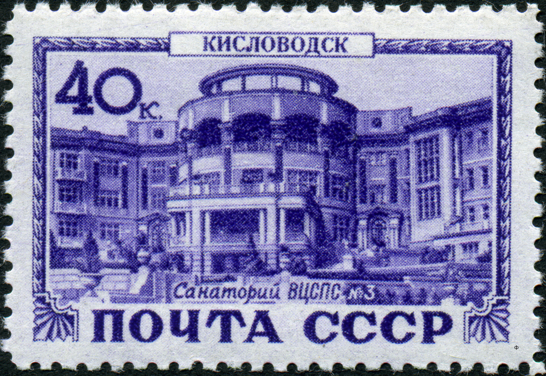 Марка СССР